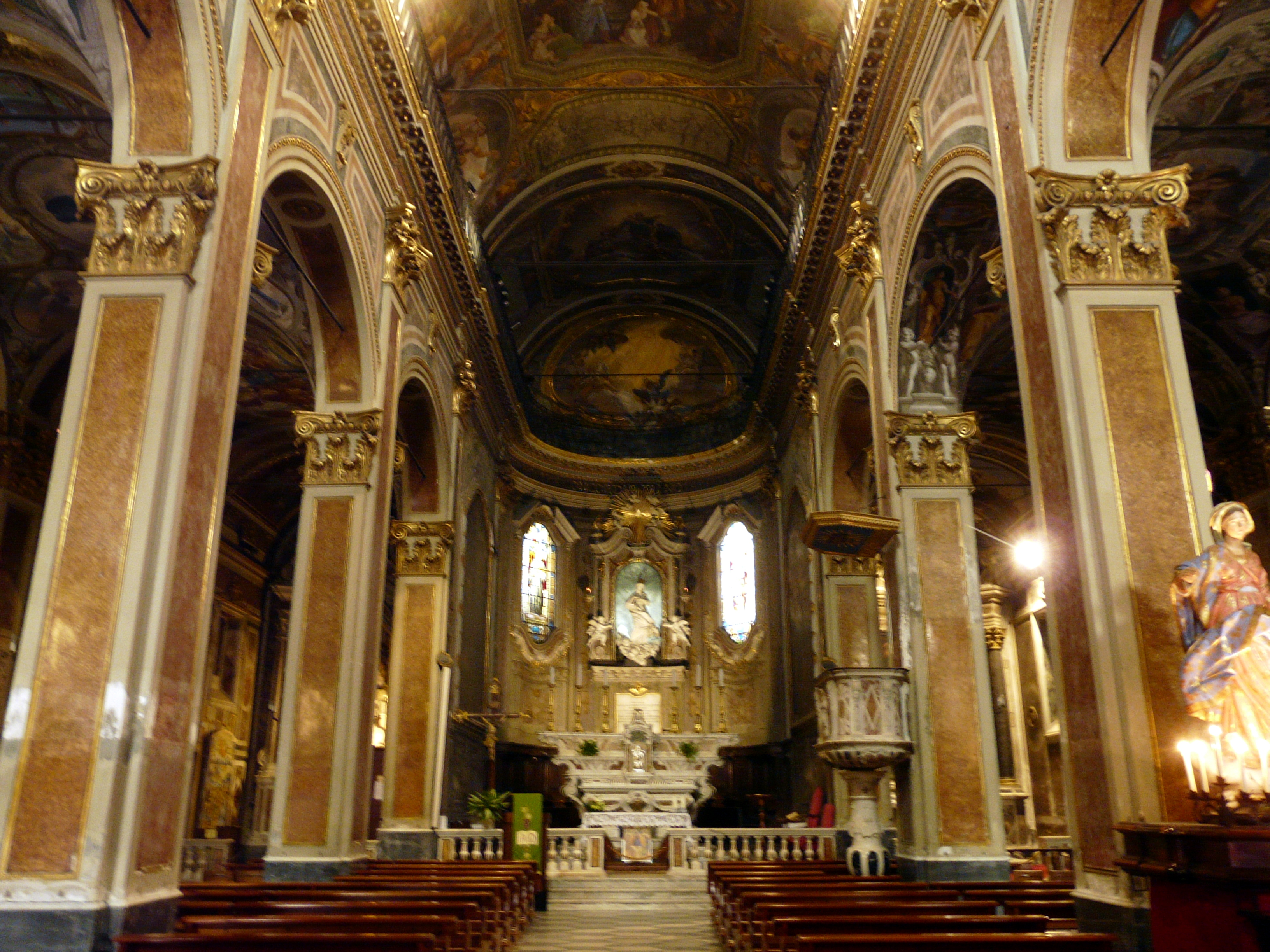 Navata centrale della chiesa di Nostra Signora della Concordia, Albissola Marina, Liguria, Italia